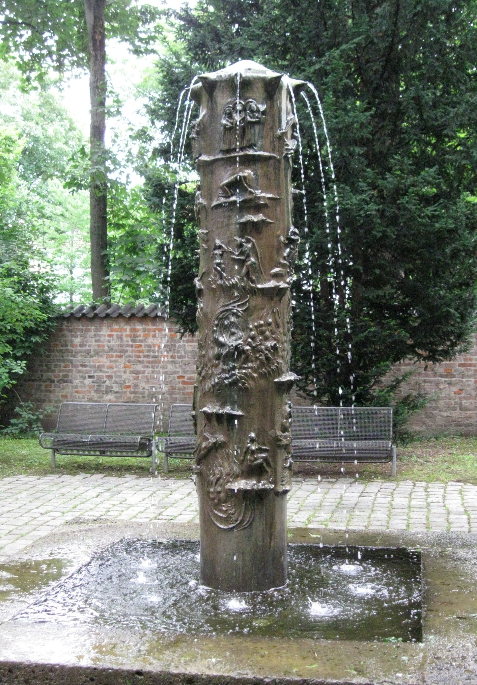 Max Faller, Dantebrunnen, 1965, München